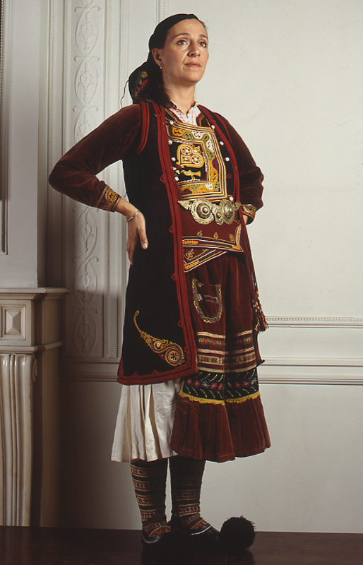 Νυφική ή γιορτινή φορεσιά από τους Άγιους Πάντες Θεσπρωτίας. Συλλογή Πελοποννησιακού Λαογραφικού Ιδρύματος, Ναύπλιο